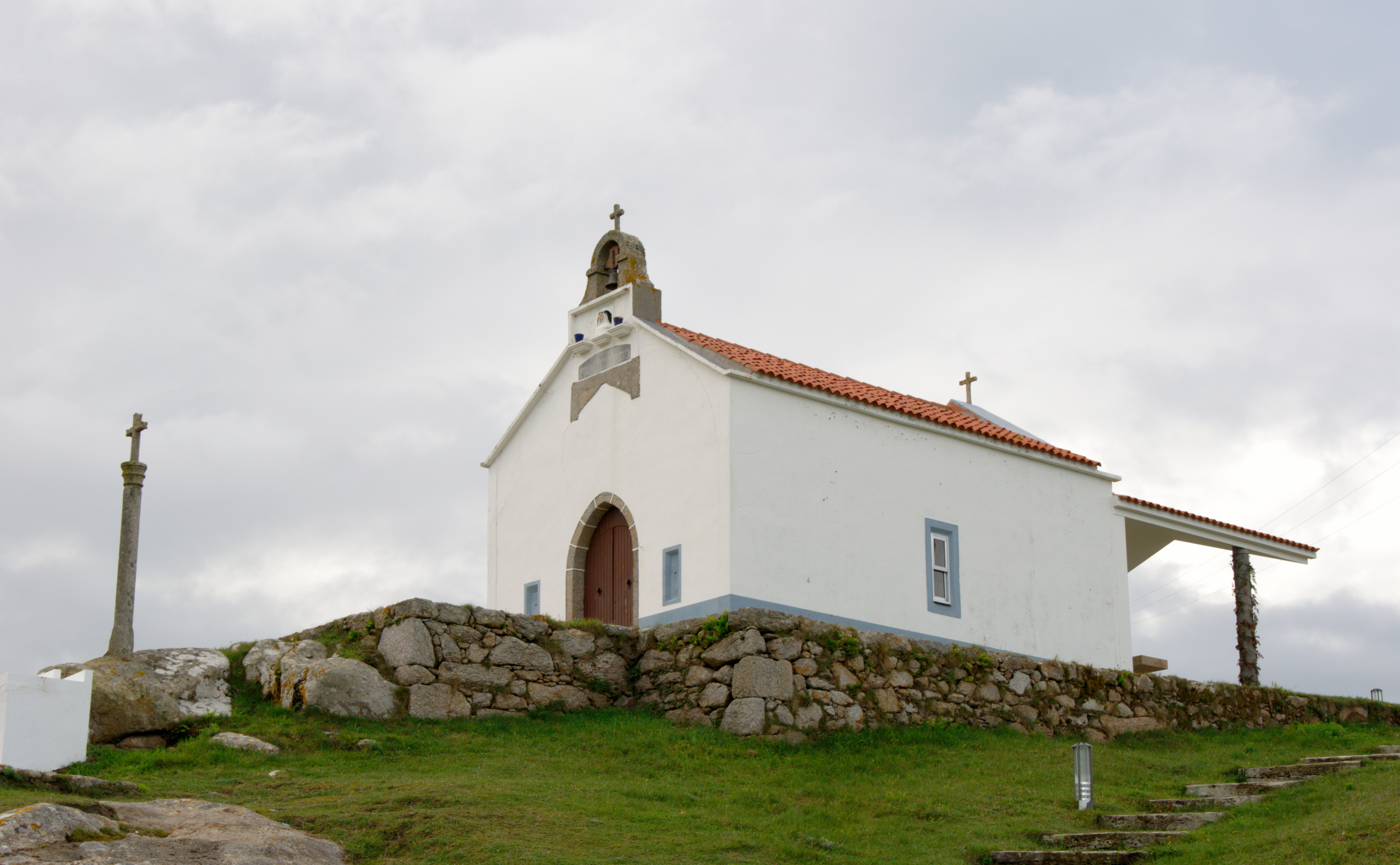 Laxe en Galicia, capela de Santa Rosa de Lima